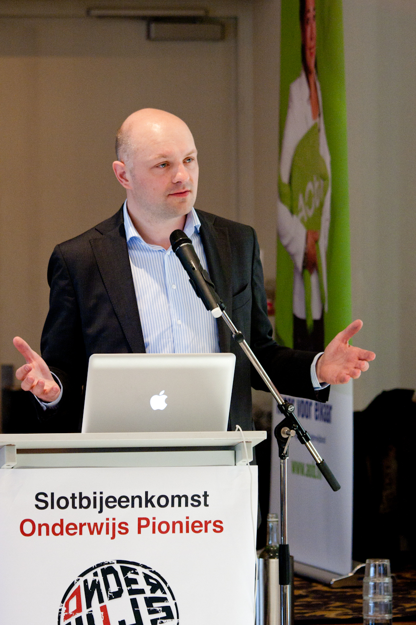 Boris van der Ham